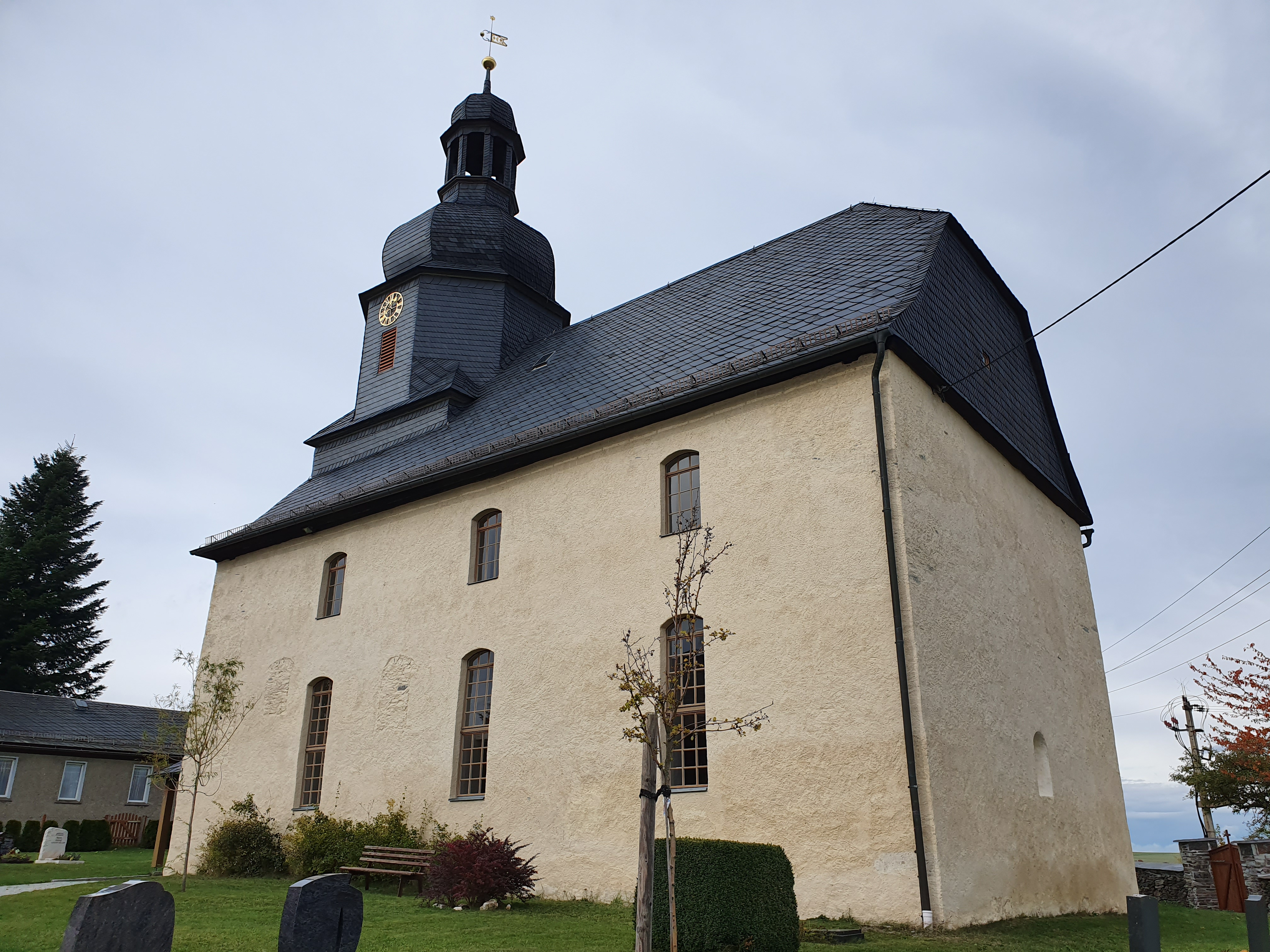 Kirche von Weisbach, Remptendorf in Thüringen